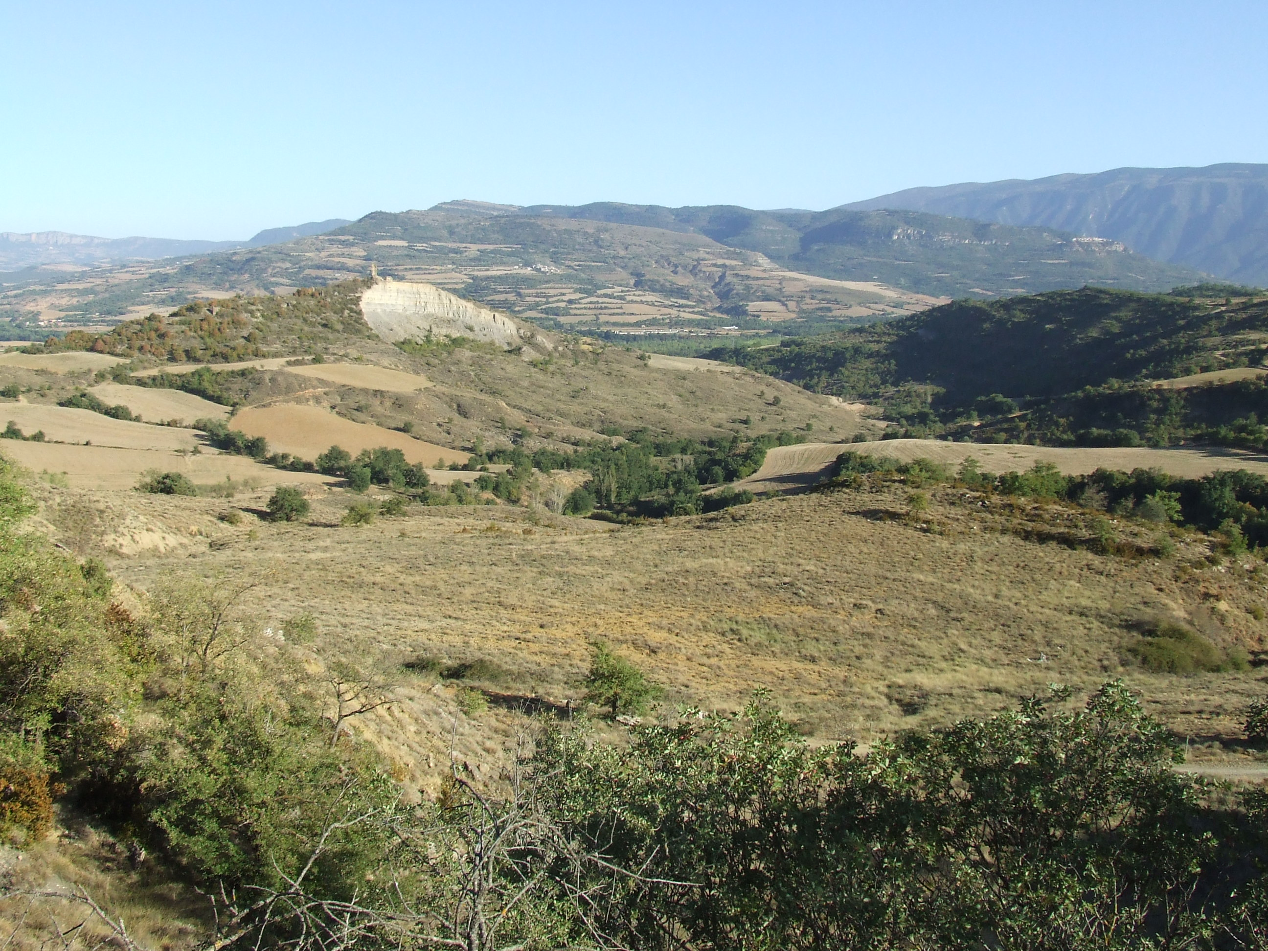 Paredades (Puigmaçana, Mur, Castell de Mur, Pallars Jussà)